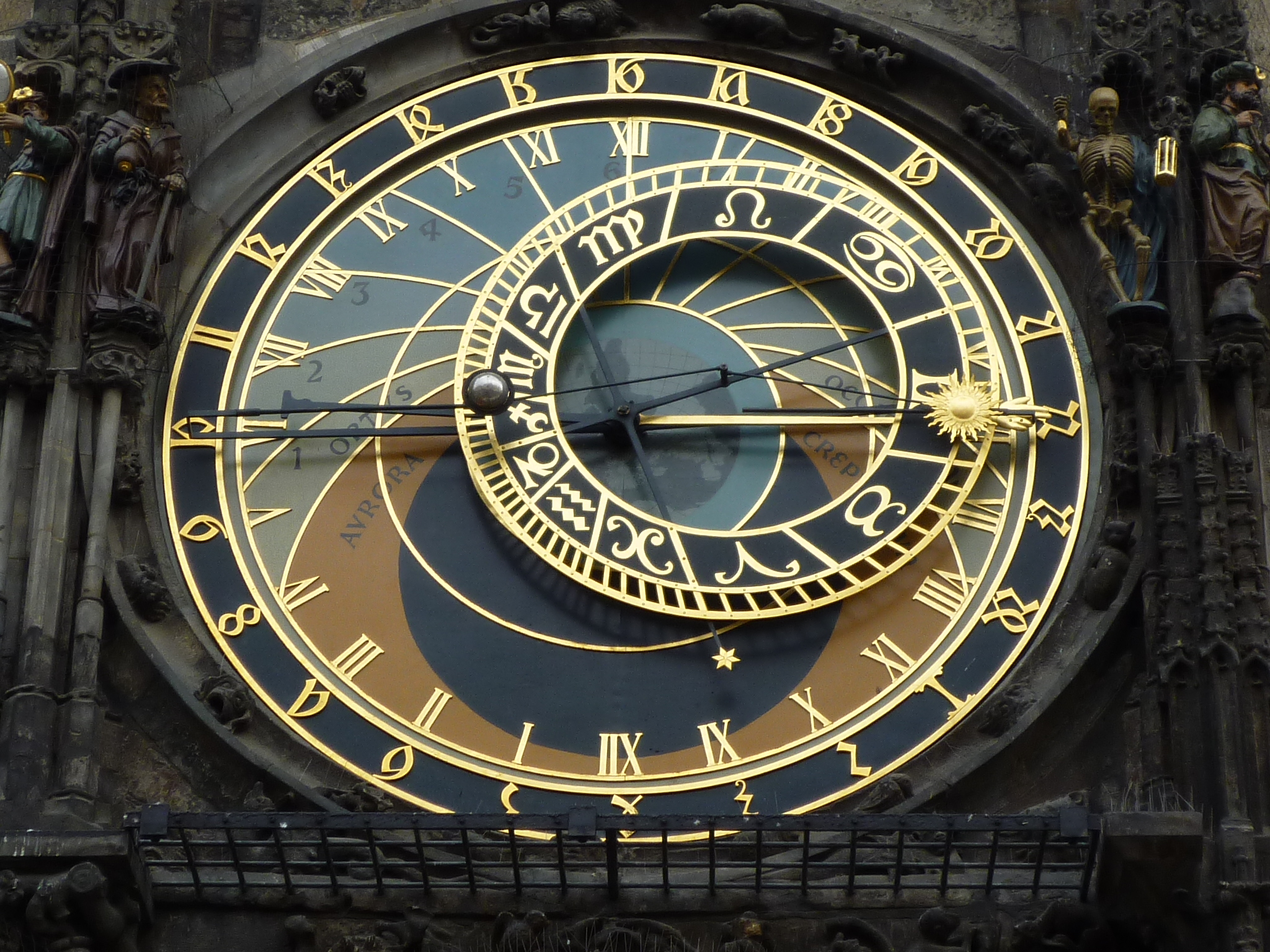 Reloj astronómico en el centro de la Praga Vieja